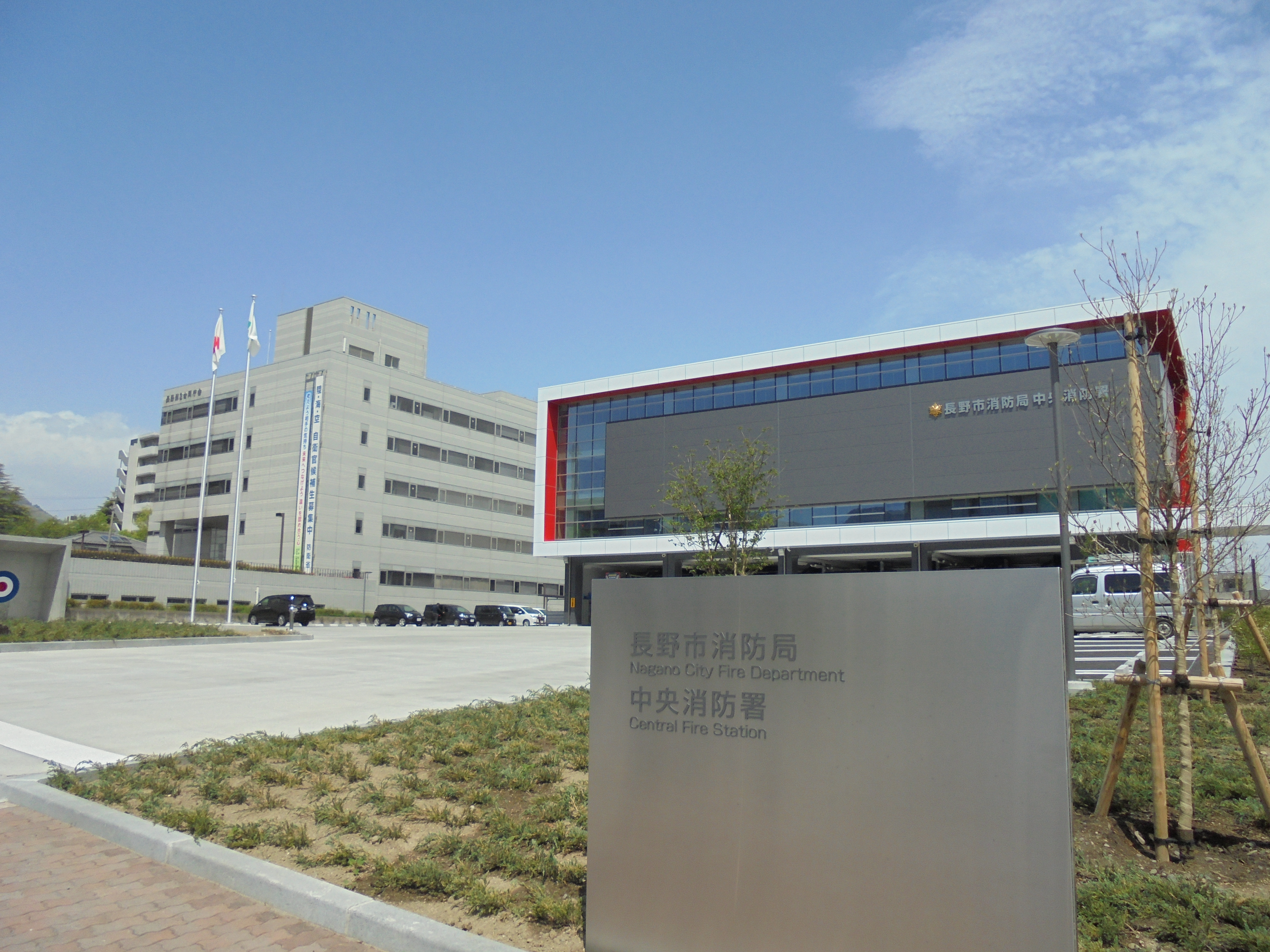 長野市消防局中央消防署（長野県長野市旭町）